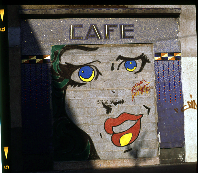 Pochoir et peinture sur une devanture de café murée.Réalisé par Roger Dimanche à Nantes